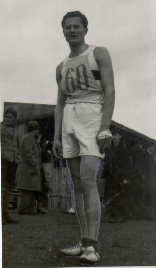 Ivan Krevs (1912-1990), Slovene athlete.